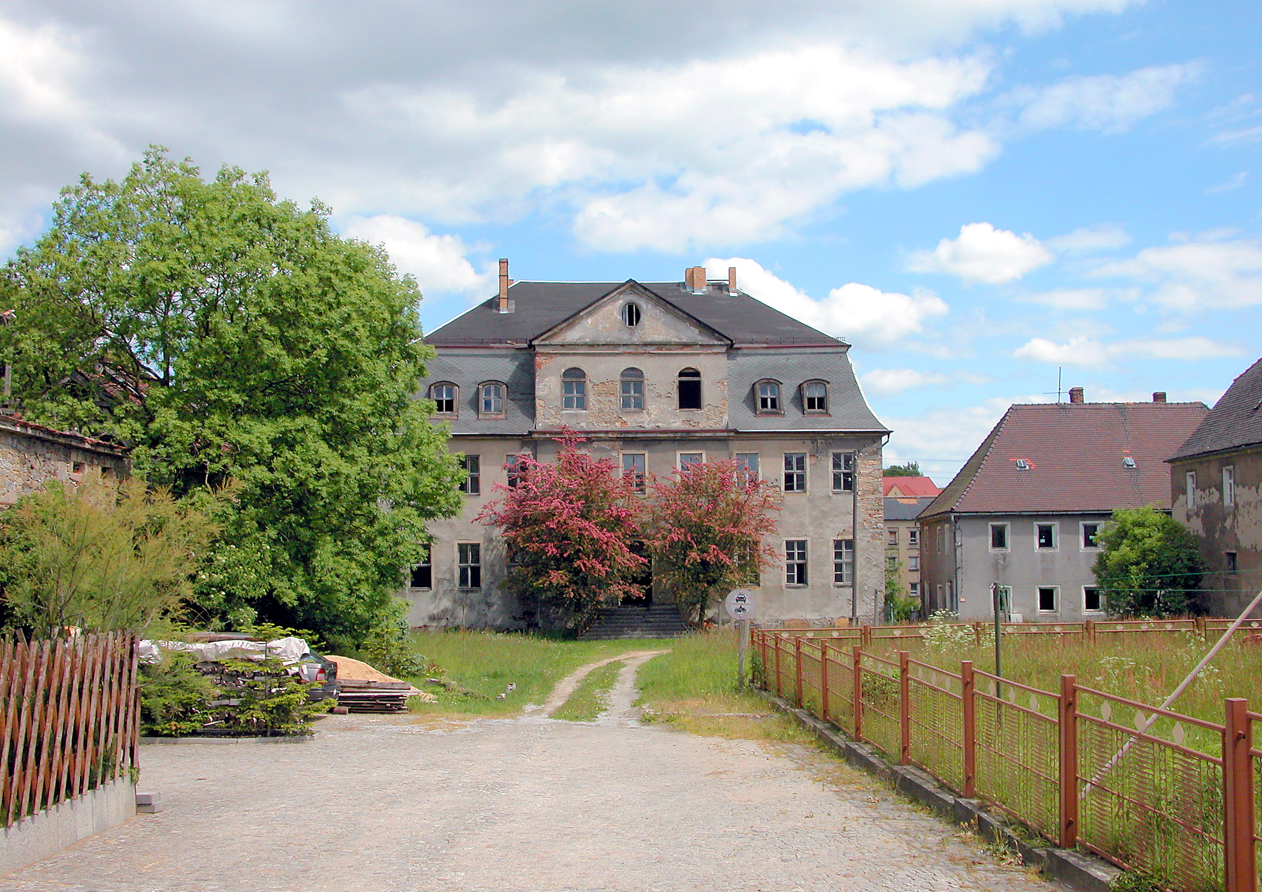 02.06.2006 01877 Schmölln (Schmölln-Putzkau), Am Rittergut 1: Schloß, errichtet 1748 bis 1750 unter Johanna Dorothea Matthaei. In der DDR Kulturhaus mit Heimatmuseum, Bibliothek, Kindergarten und Galerie. 1994 privatisiert. Sicht von Westen, Hofseite. [DSCN10316.TIF]20060602135DR.JPG(c)Blobelt